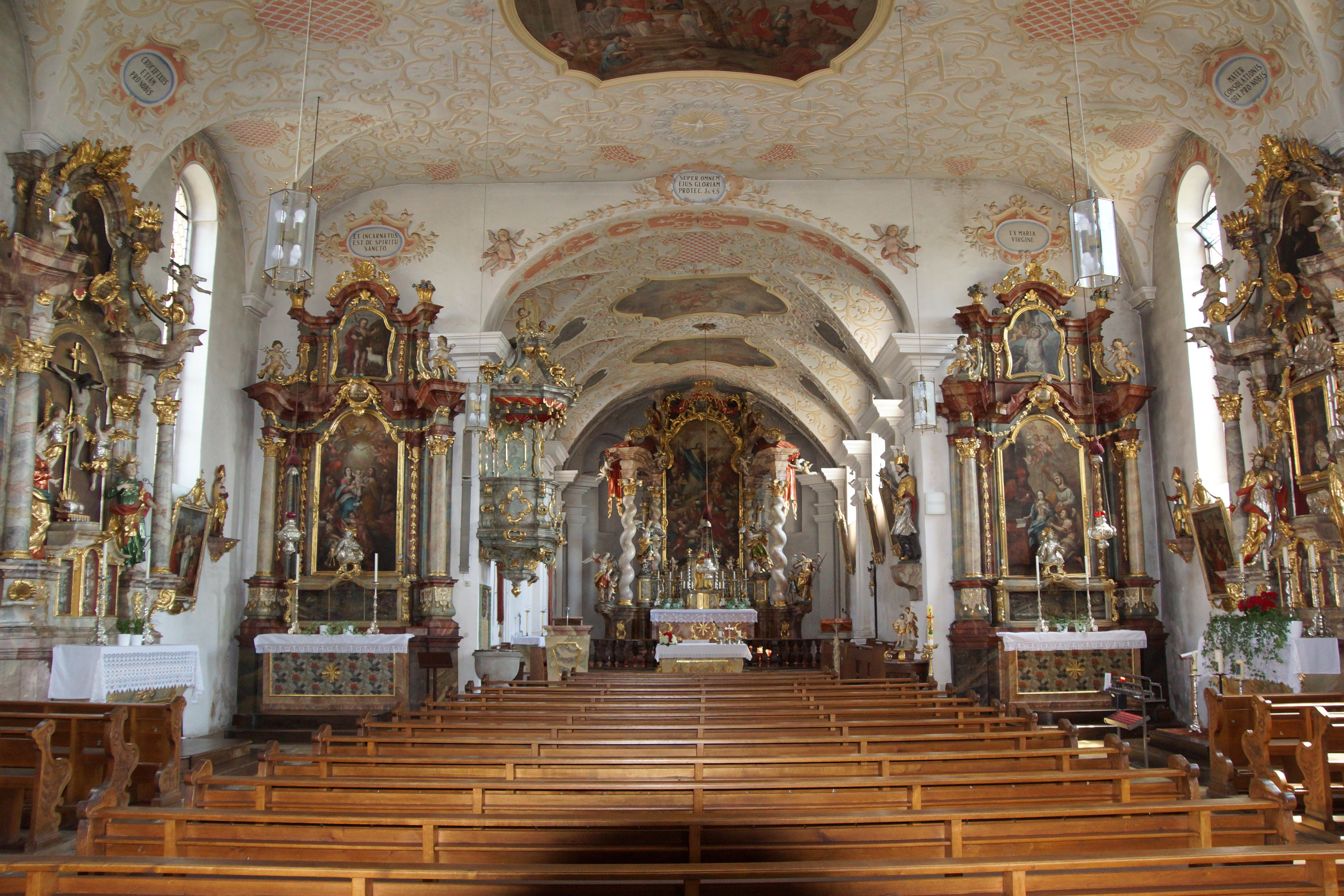 Pfarr St. Martin in Luhe